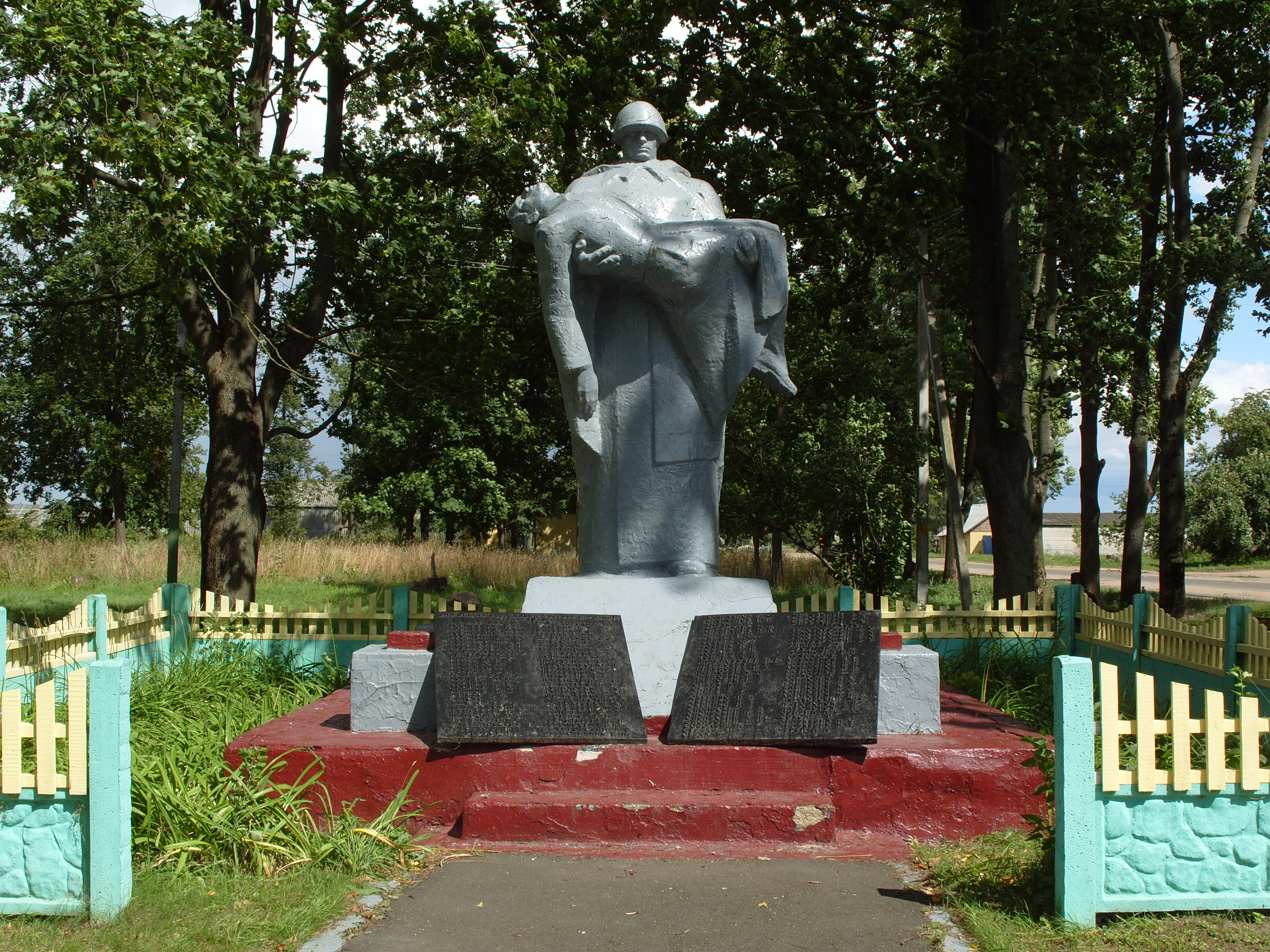 Беларуская (тарашкевіца): Сяліба, скульптура воіна.